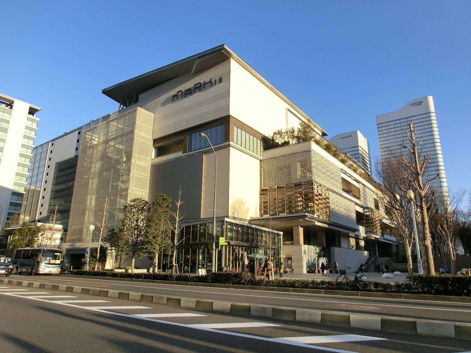 ＭＡＲＫ15号館か…との声もあり…